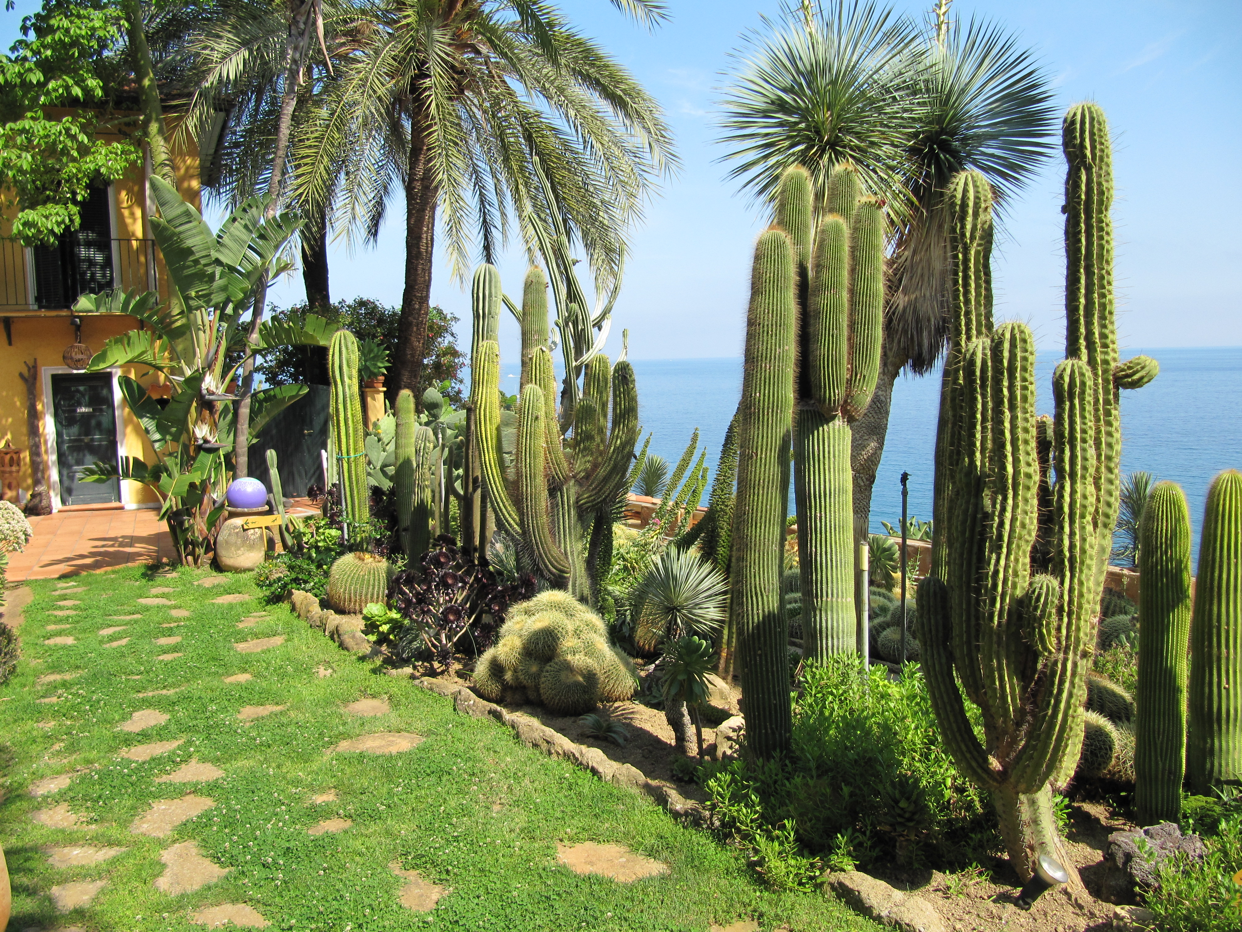 jardin exotique - giardino esotico